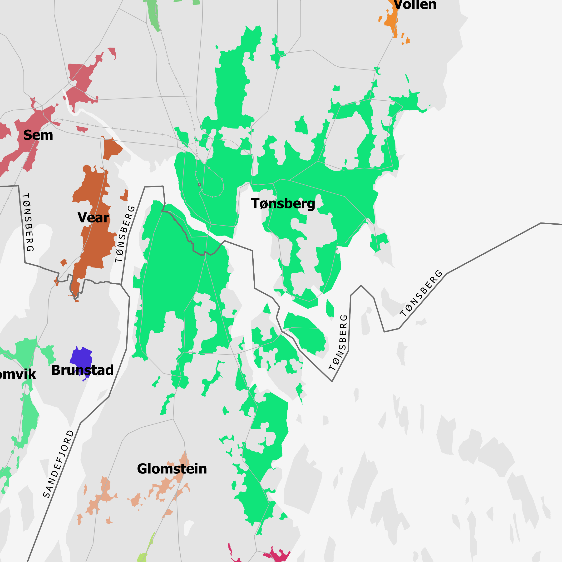 Tettsted 2521 Tønsberg pr. 1.1.2018